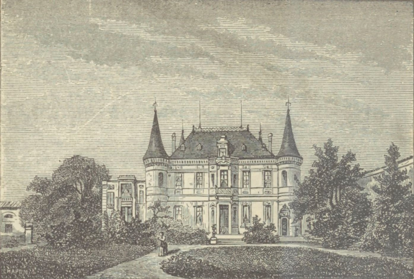 Illustration du Château Palmer dans l'ouvrage Bordeaux et ses vins (7ème édition) de Charles Cocks et Edouard Féret publié en 1898